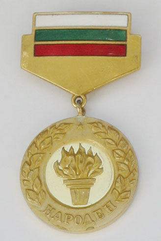 Медал на почетното звание „Народен“